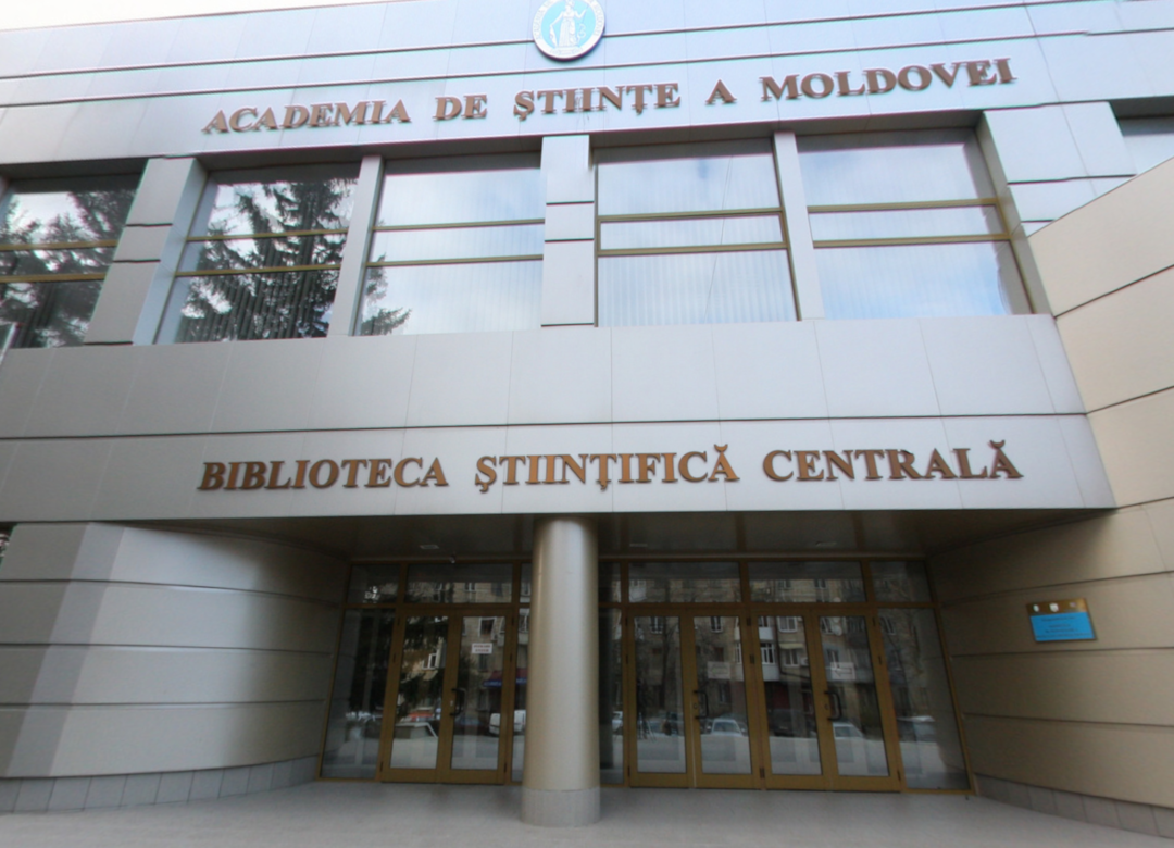 Blocul central al Bibliotecii Academiei de Ştiinţe a Moldovei